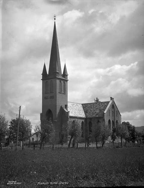 Fiskum kirke fotografert i 1927. Kirken var opprinnelig tegnet av Heinrich Ernst Schirmer i nygotikk i 1864-66. Kirken brant i 1902 og ble gjenreist i 1903 etter Schirmers opprinnelige tegninger ved Jørgen Haslef Berner. Den andre kirken brant ned nyttårsnatten 1940.